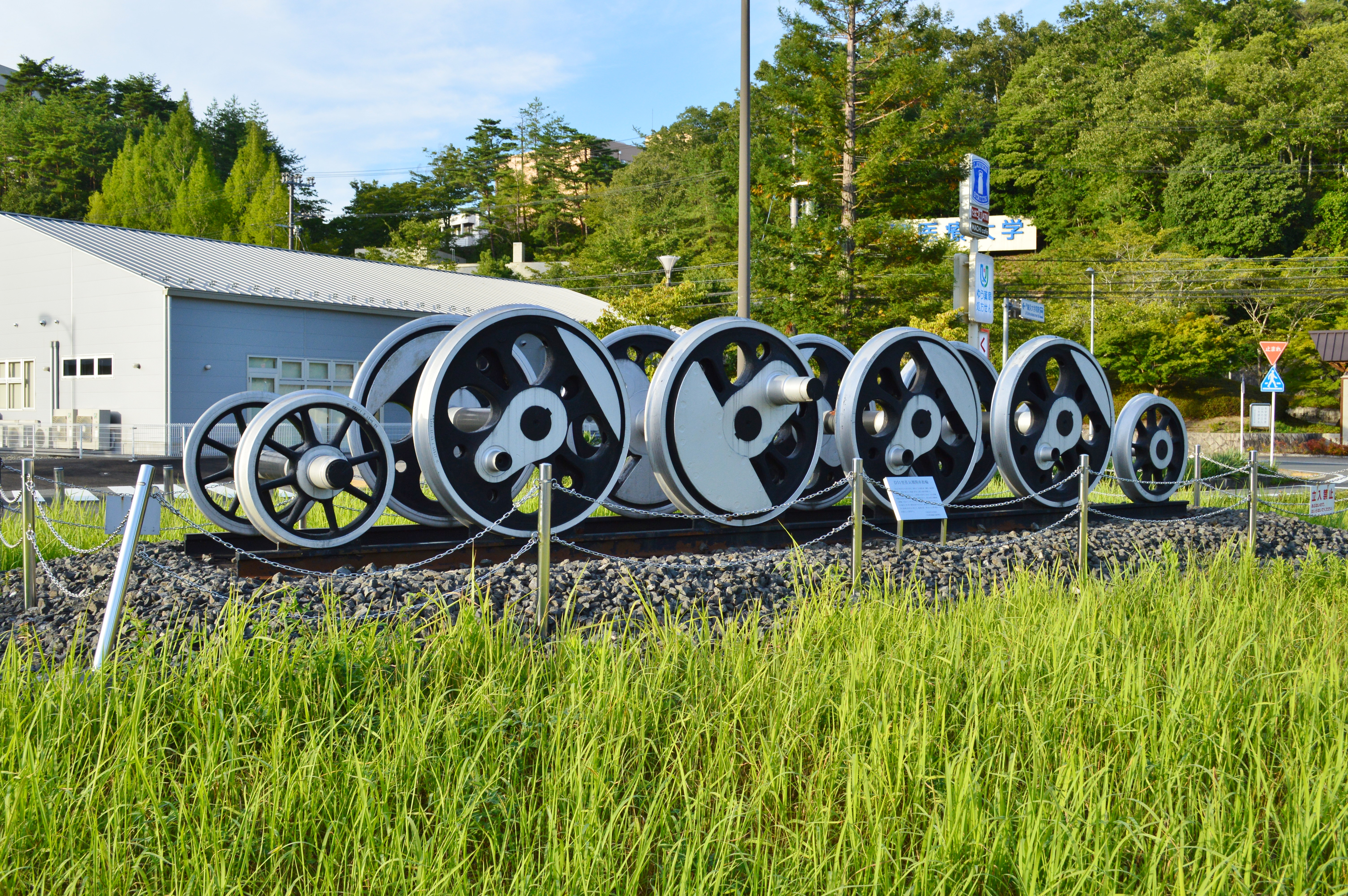 D51 567動輪 (鍼灸大学前駅にて)